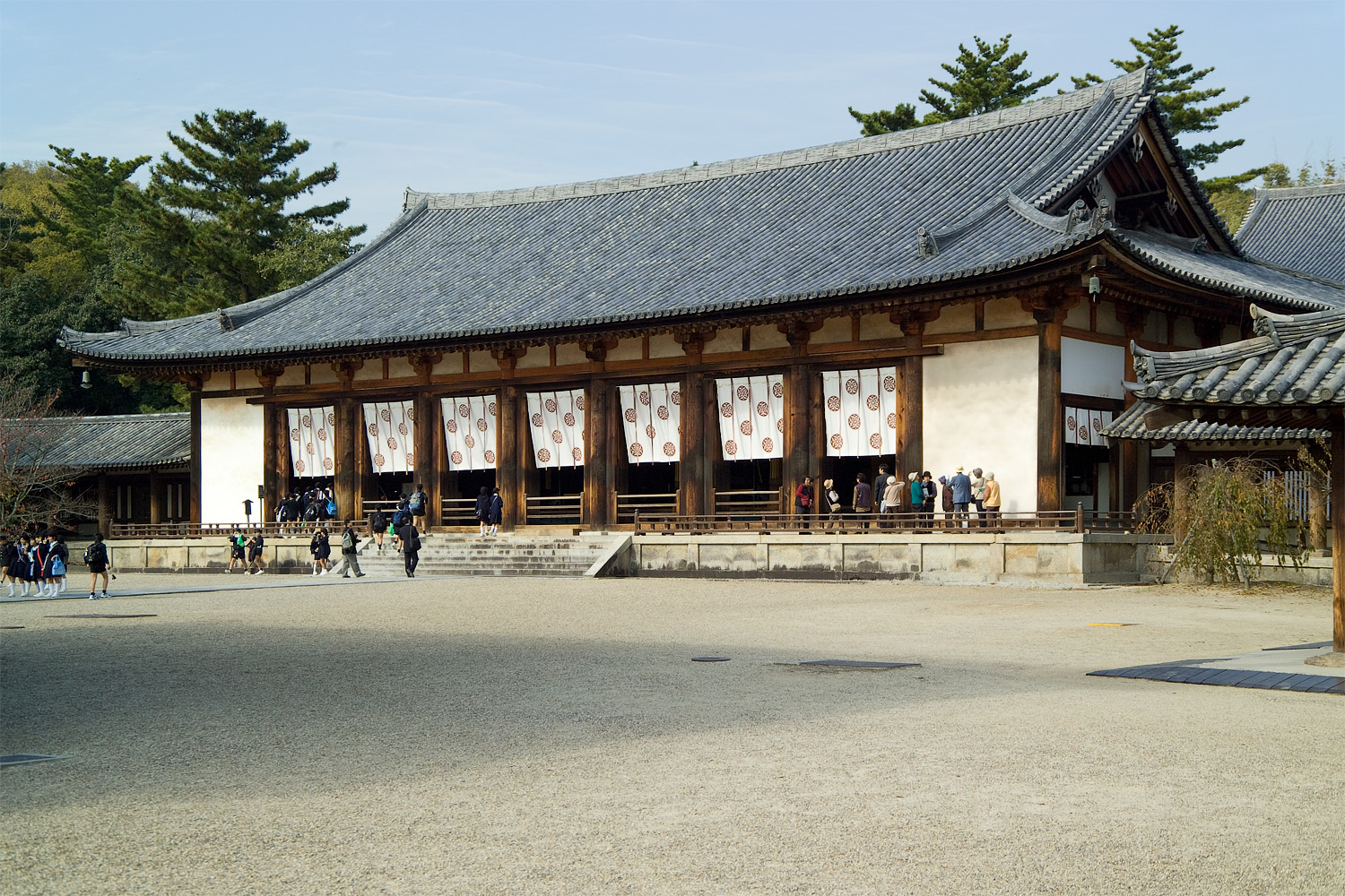 Hōryū-ji 法隆寺 Ikaruga Nara Prefecture Japan 奈良県生駒郡斑鳩町